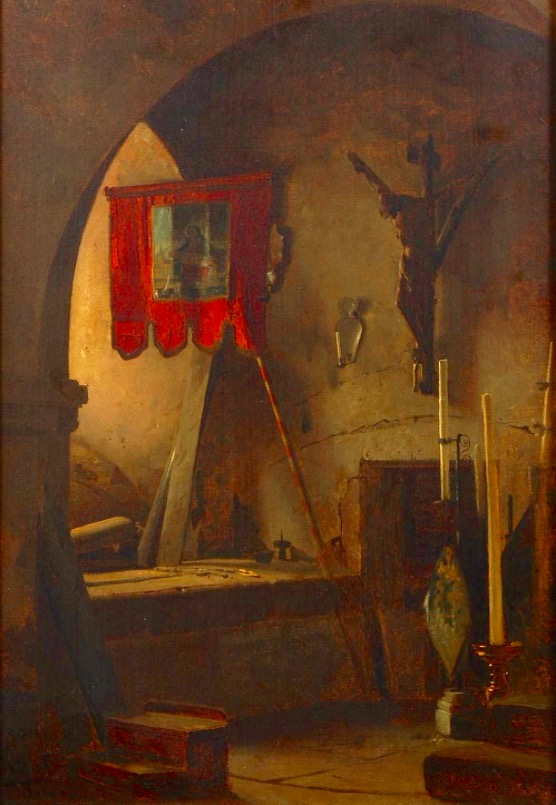 Adolf Seel: Klosterinterieur in Andernach, wohl 1860er Jahre, Öl auf Holz, 42 x 28 cm, Privatsammlung Wiesbaden.